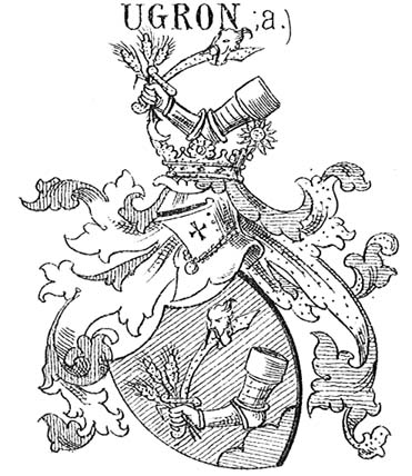 Blason de la famille hongroise Ugron d'Abránfalva.